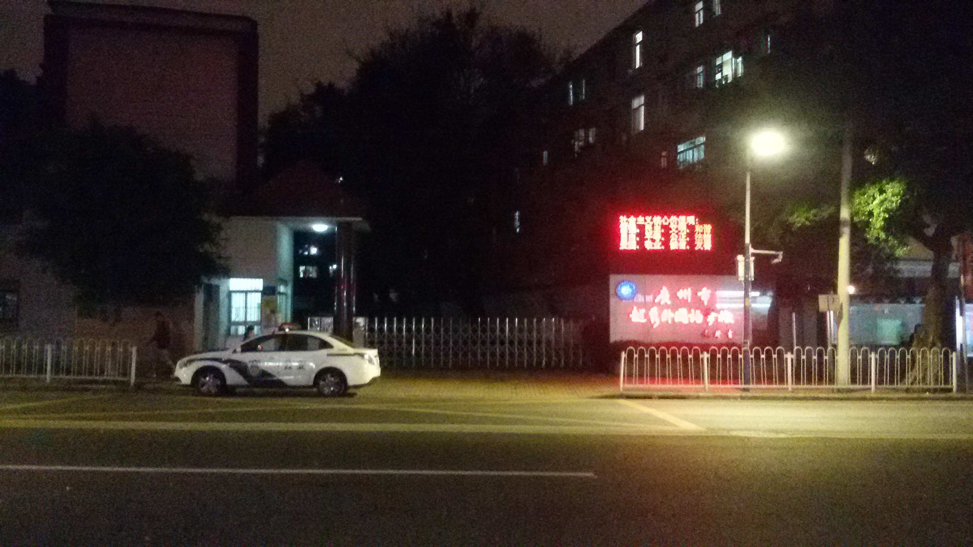 粵語: 越秀區外國語學校正門